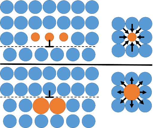 Liuoslujituksen periaate.